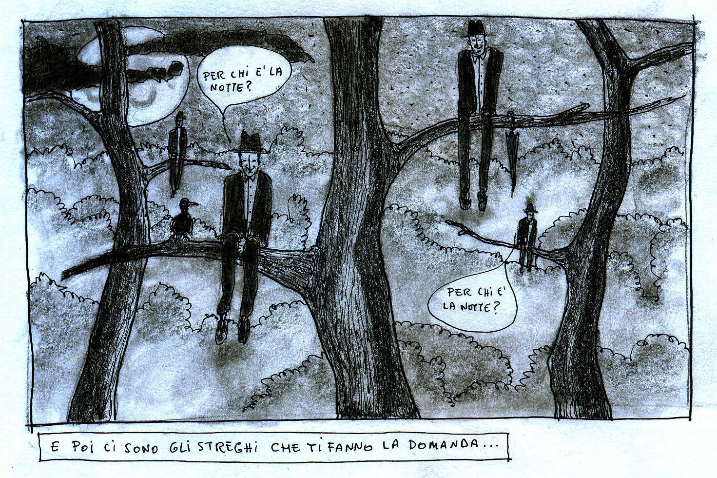 Rappresentazione artistica degli "steghi", di Giacomo Agnetti.